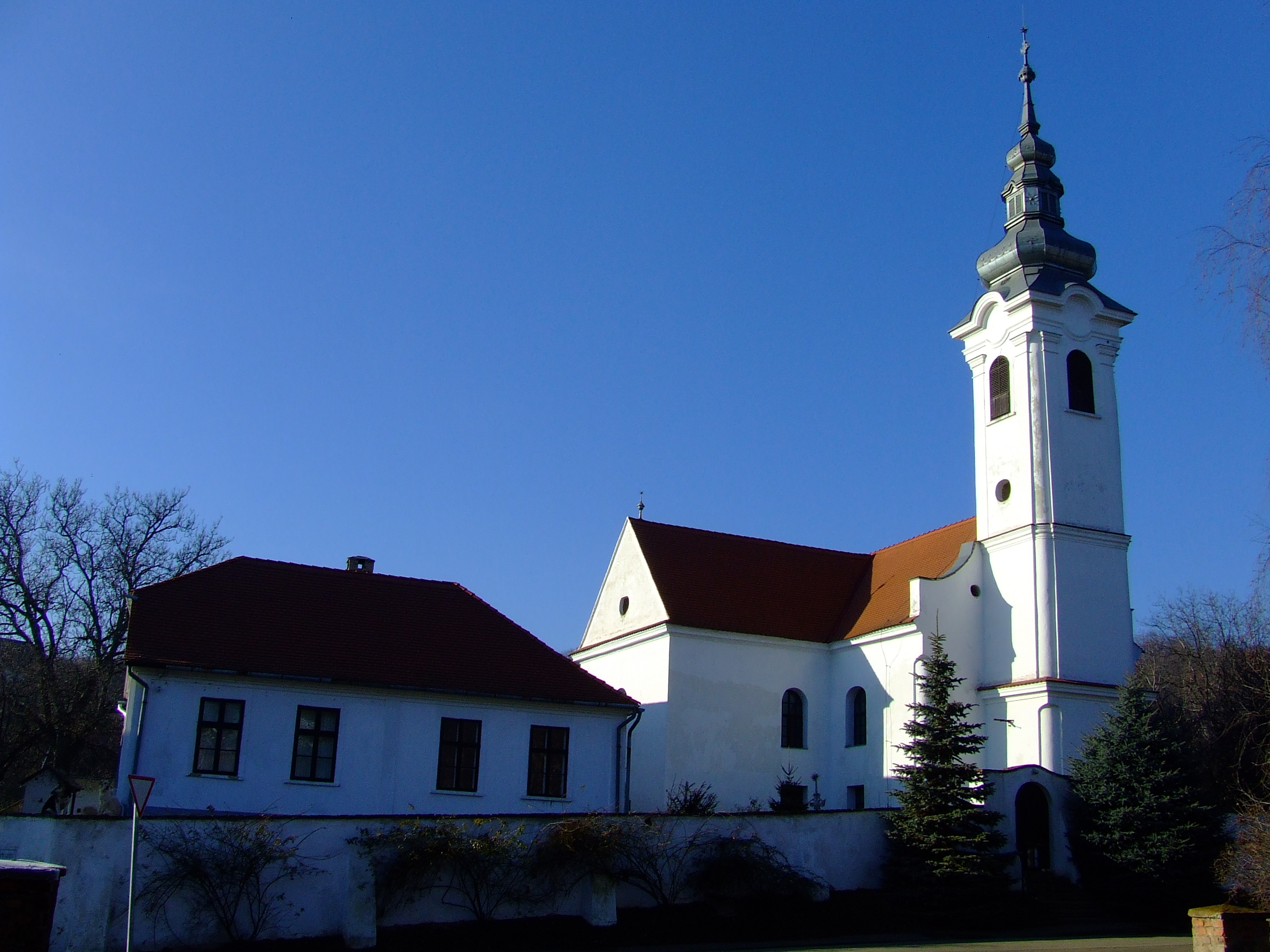 Zengővárkony: A Református temlom télen